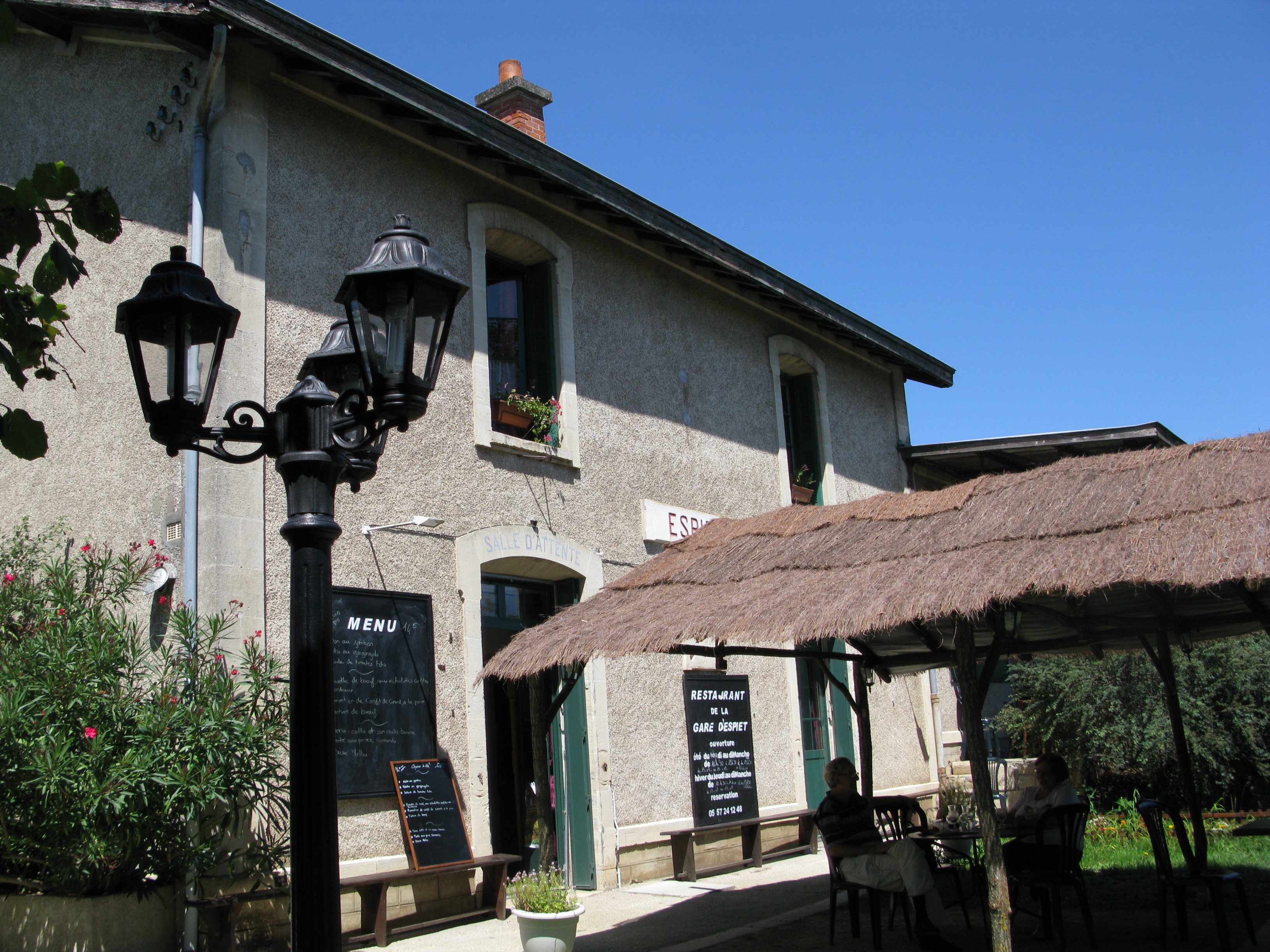 L'ancienne gare d'Espiet, transformée en restaurant, le long de la piste Roger Lapébie